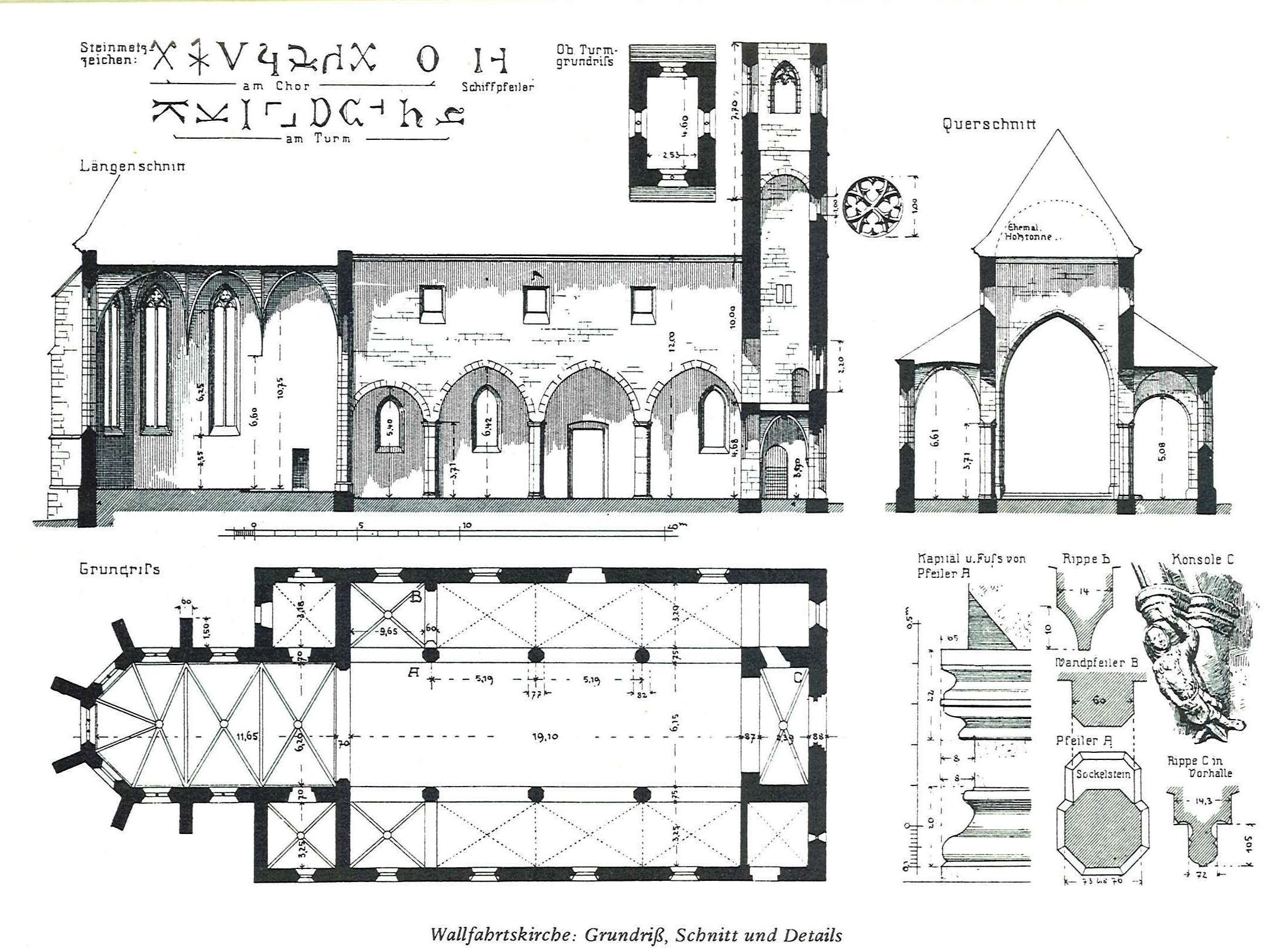 Grundriss, Schnitt, Details, St. Maria de Rosario (Dimbach)